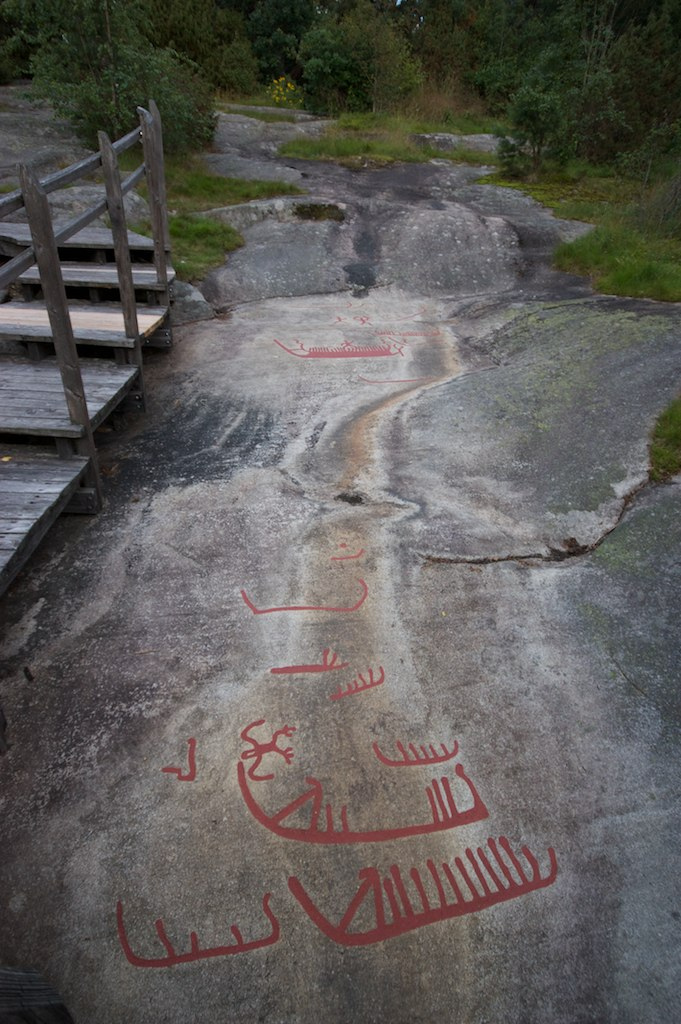 Helleristninger på Begby